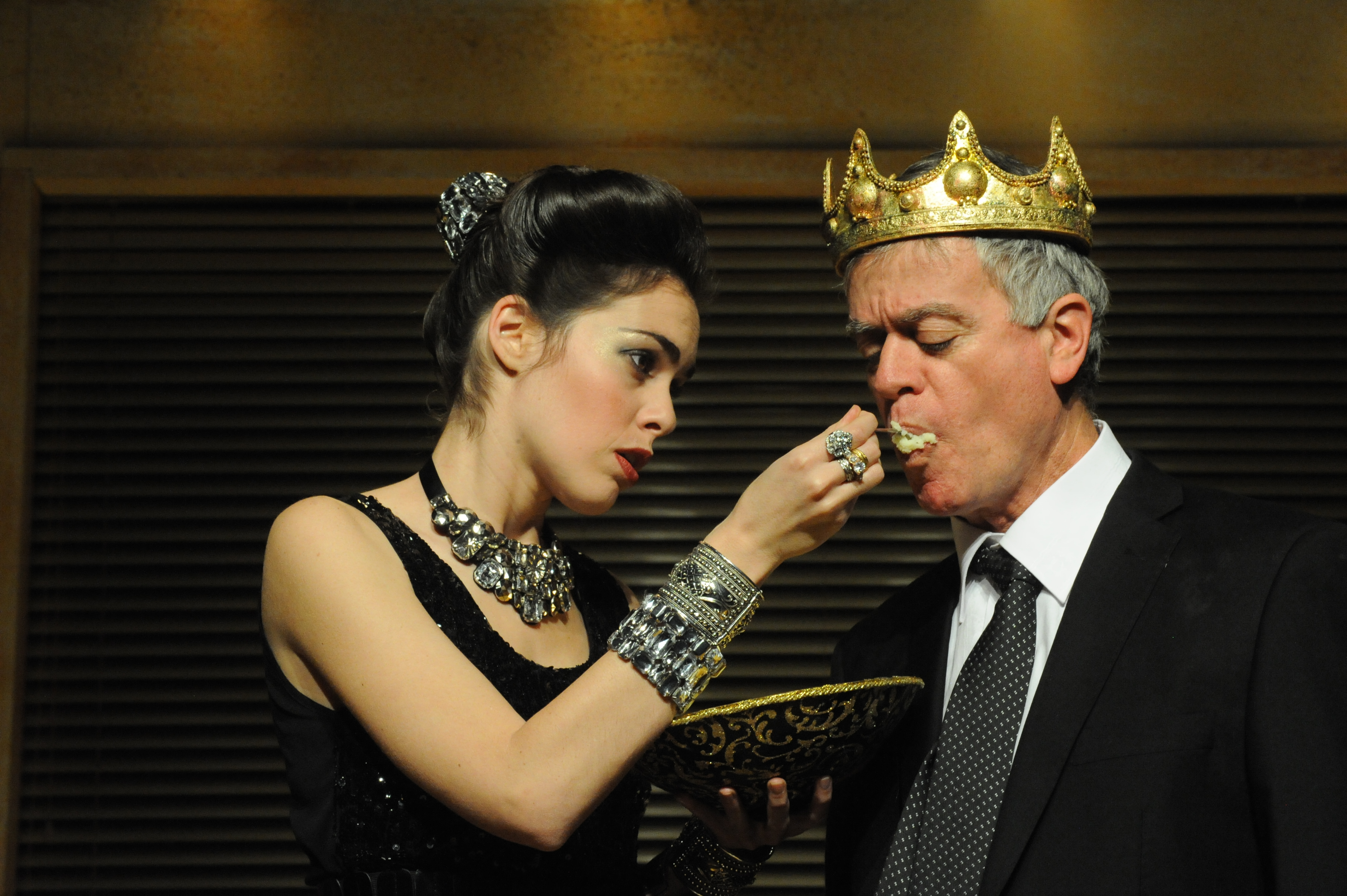 ההצגה "אוכלים" בבימויו של מיקי גורביץ', תיאטרון החאן, 2011